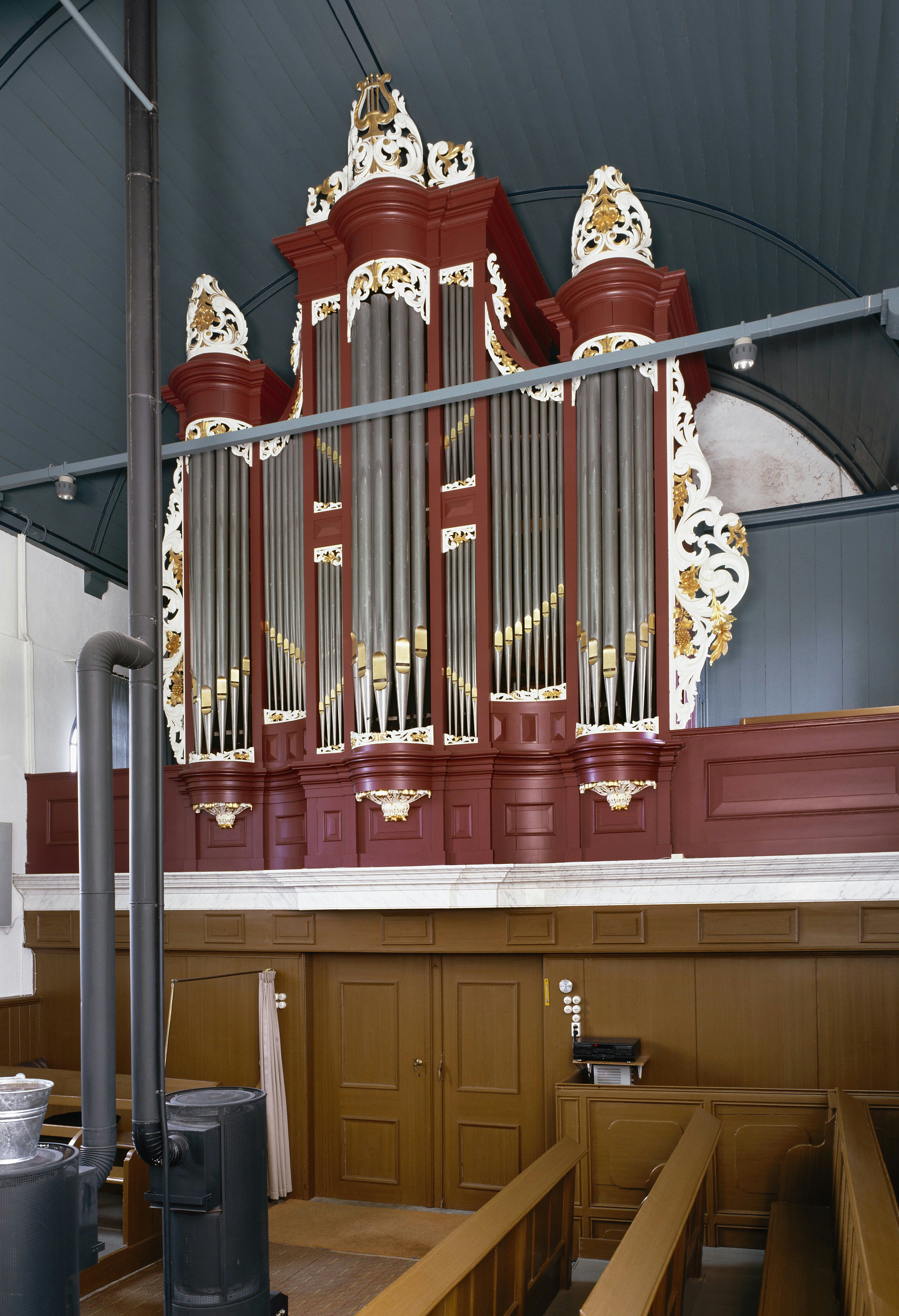 Nederlands Hervormde Kerk: Intenieur, aanzicht orgel, orgelnummer 1602 (opmerking: Gefotografeerd voor Het Historische Orgel in Nederland 1872-1878, bladzijde 351)